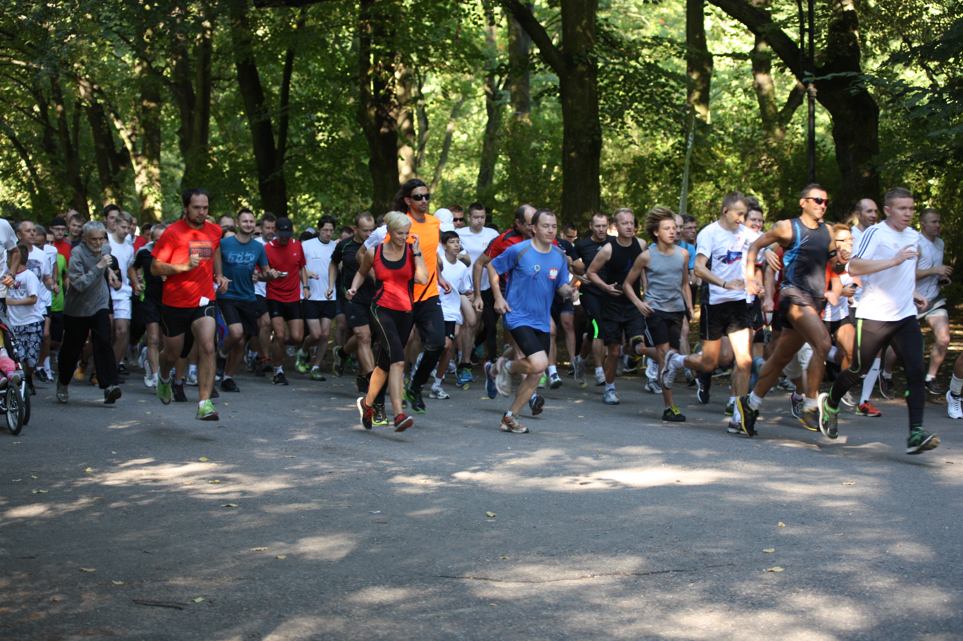 Start biegu parkrun Łódź w dniu 7 września 2013.